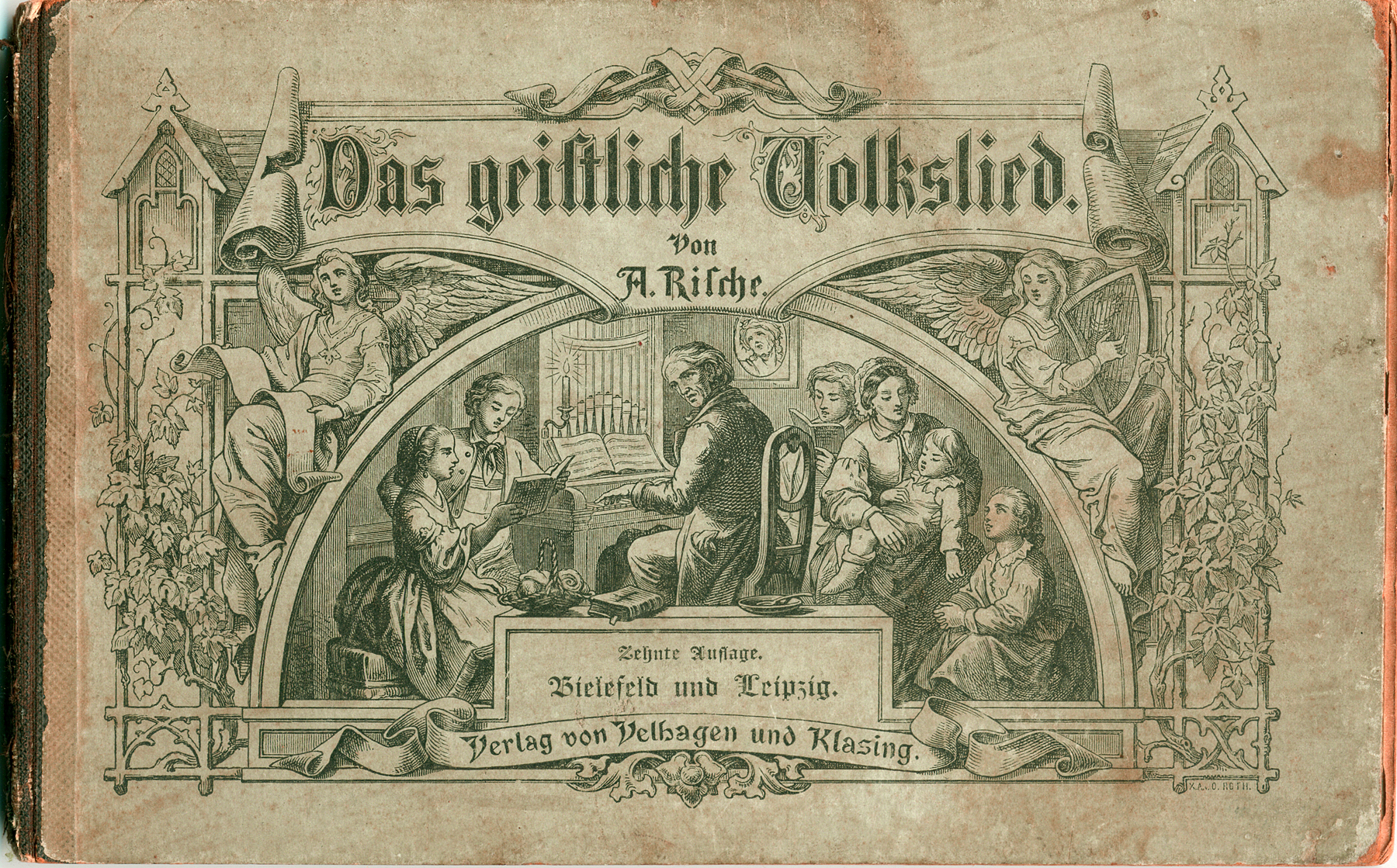 August Rische: Umschlag Liederbuch Das geistliche Volklied10. Auflage 1891